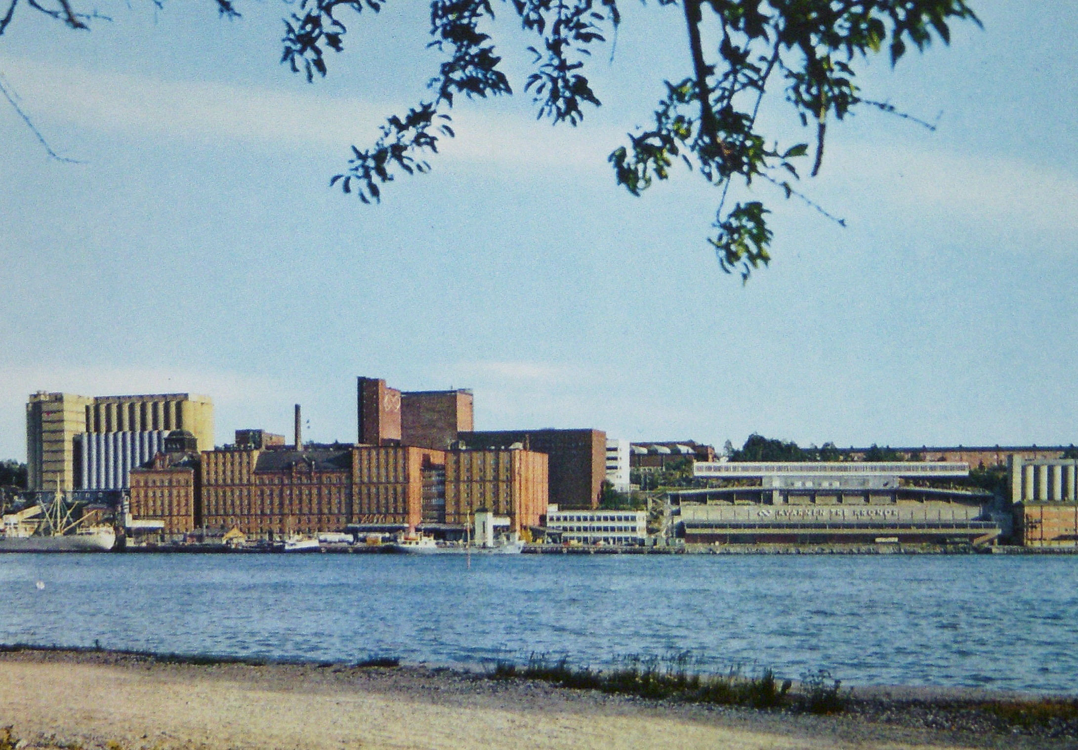 Kvarnholmen i Nacka